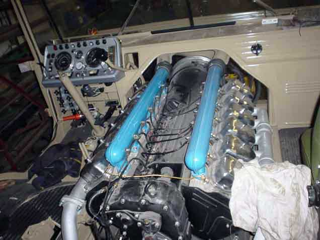 Tatra 813 engine